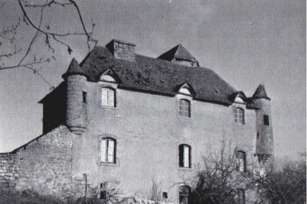 Photo du château de Fraissinet ou Freyssinet, commune du Nayrac dans le département de l'Aveyron (12)